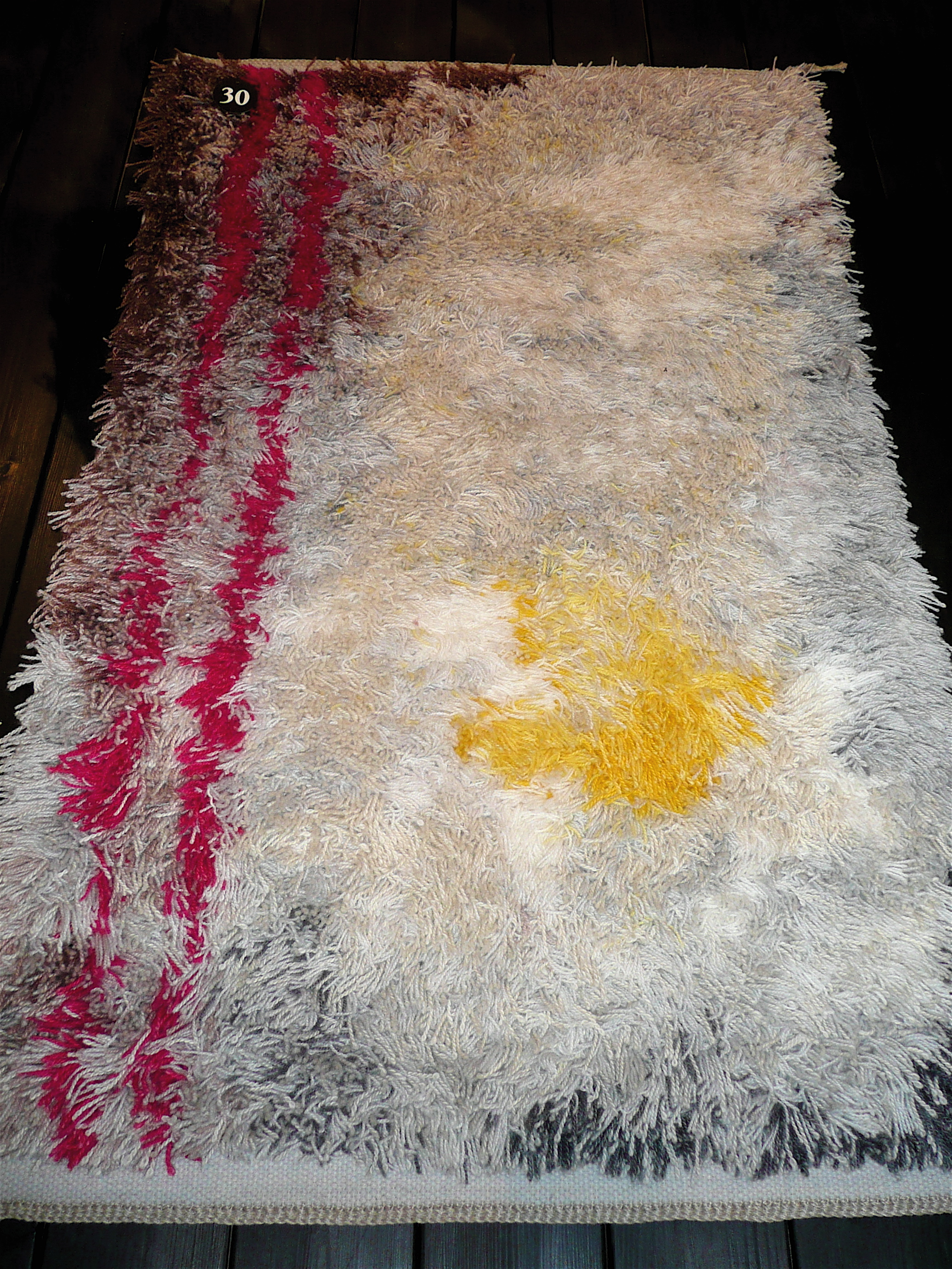 Nordiska museet - vävutställning